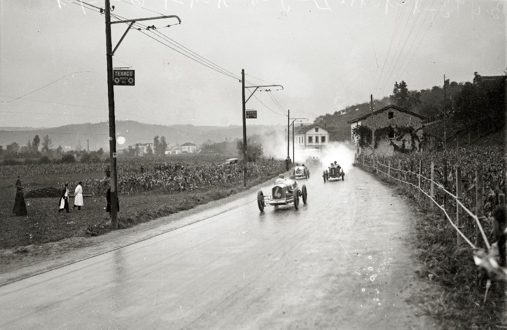 Título original: II Gran Premio de San Sebastián en el circuito automóvilistico de Lasarte (25/27) Localización: Circuito de Lasarte (Guipúzcoa)